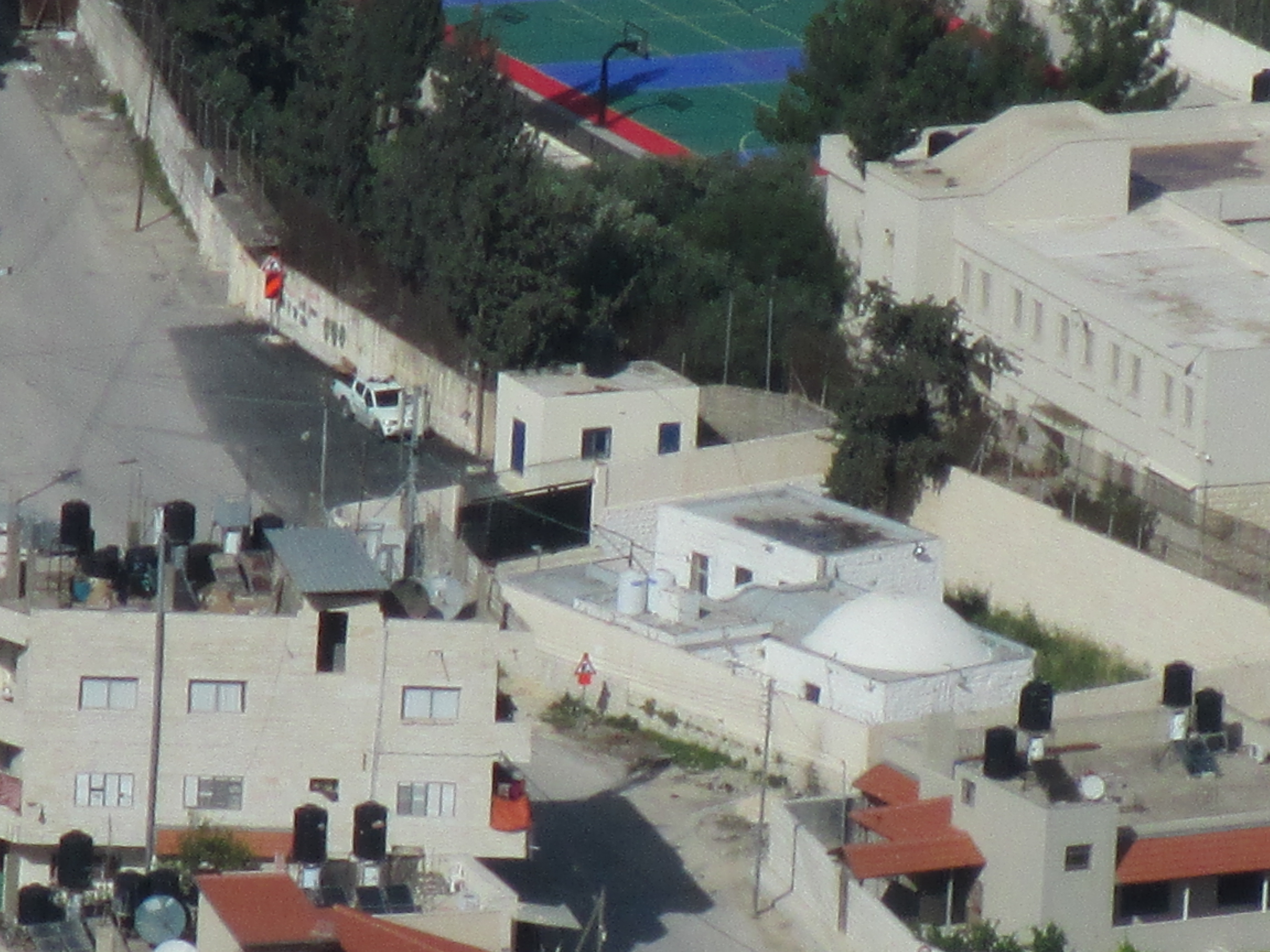 קבר יוסף בשכם מצולם ממצפה יוסף על הר גריזים